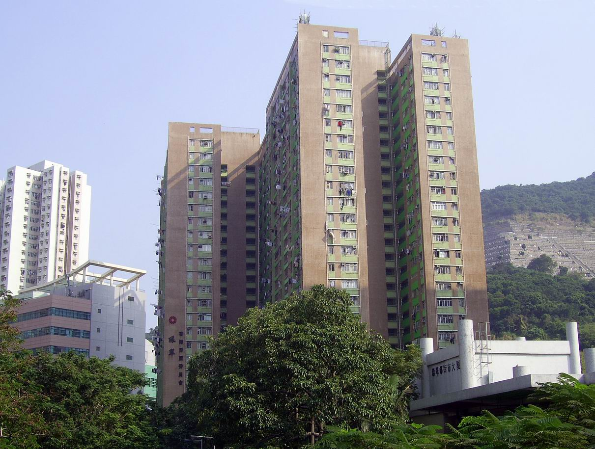 中文（香港）: 環翠邨